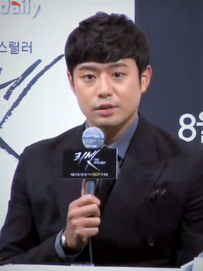 케이블채널 OCN 일요드라마 ‘리셋’ 제작발표회